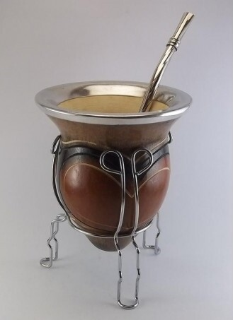 porongo